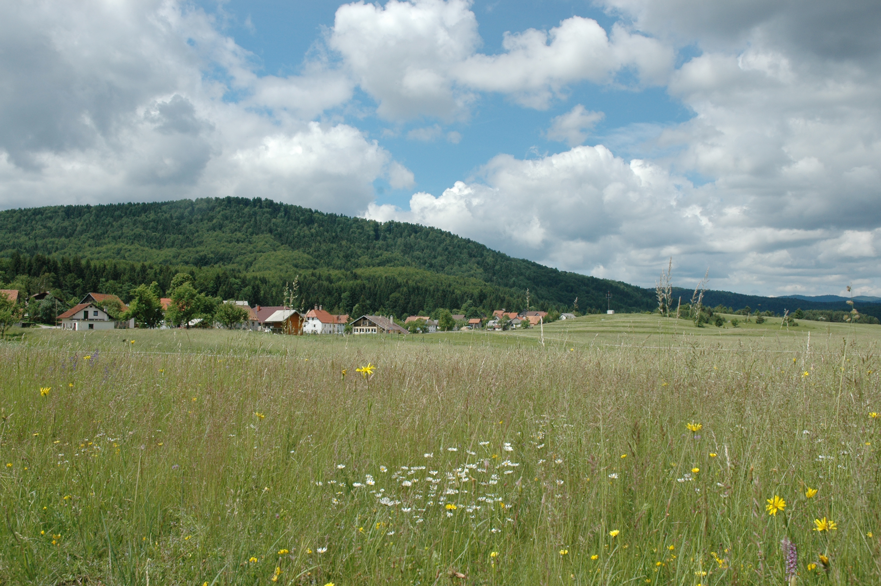 Babno polje v zgodnjem poletju